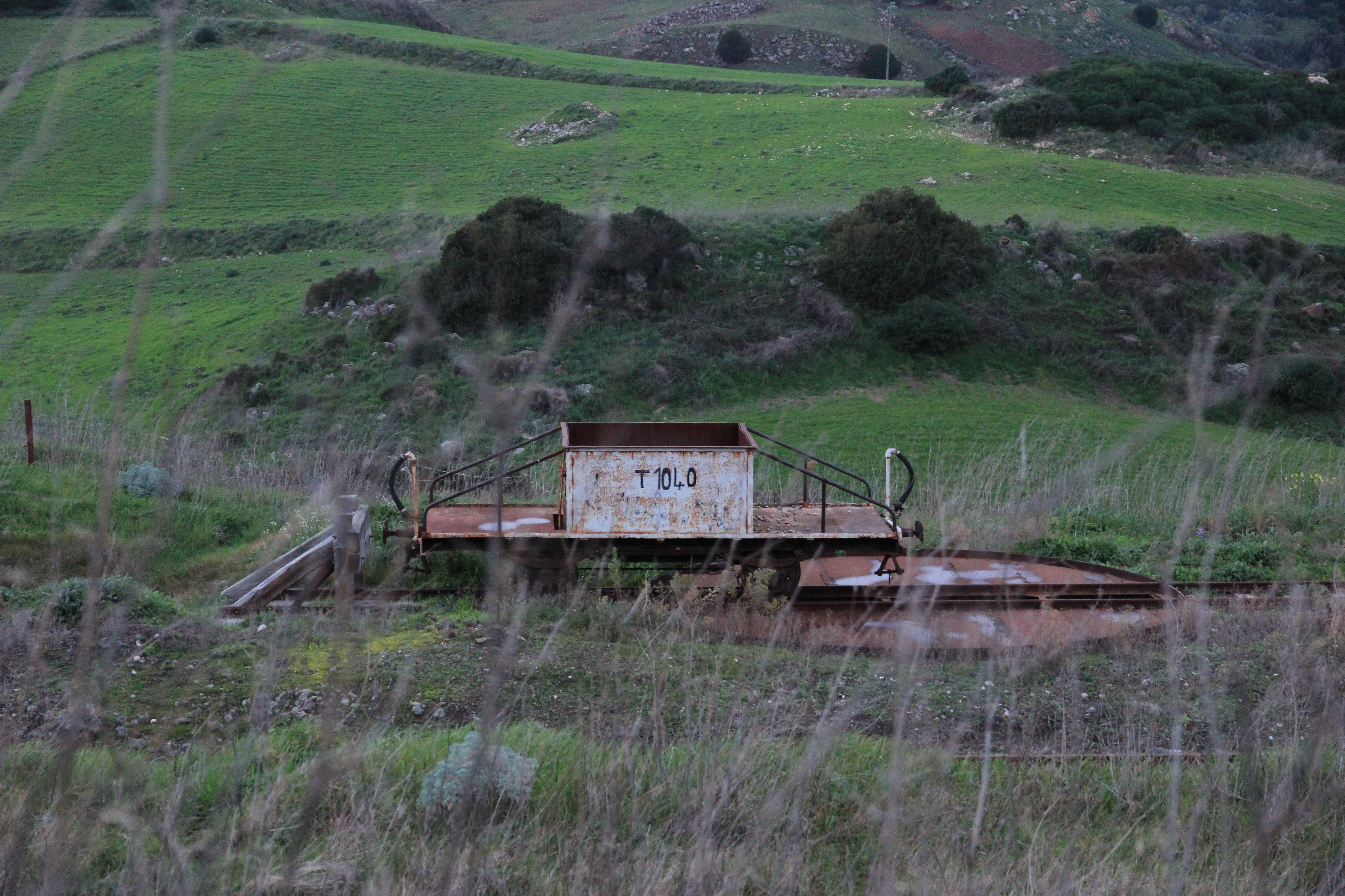 Martis - Stazione ferroviaria